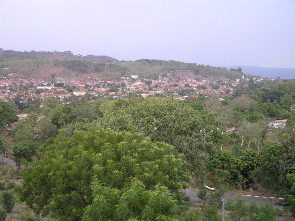 Vue d'Atakpamé